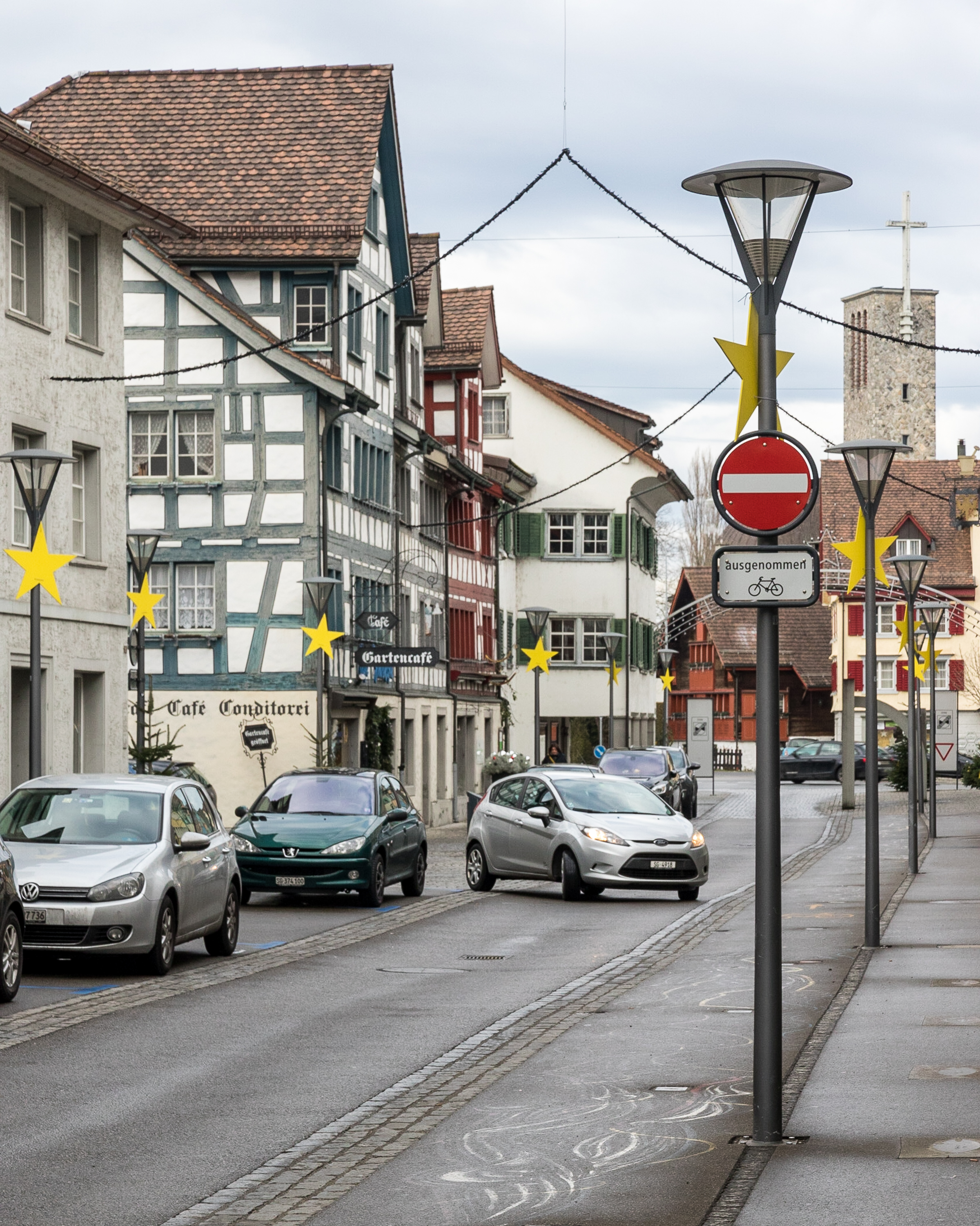 Hauptstrasse in Rheineck